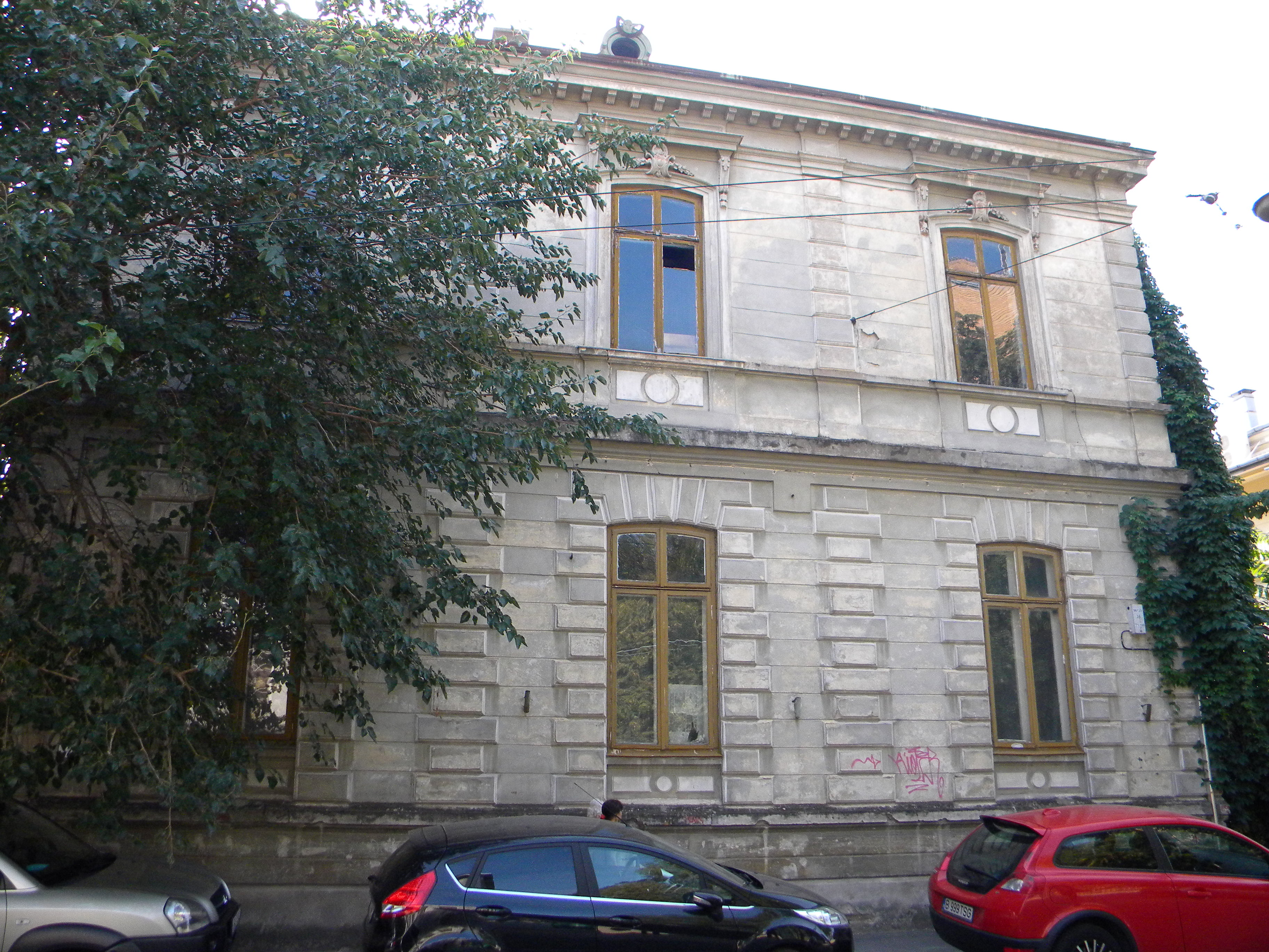 Bucuresti, Romania, Casa Mihail Sutu pe Str. Nicolae Iorga nr. 12, sect. 1